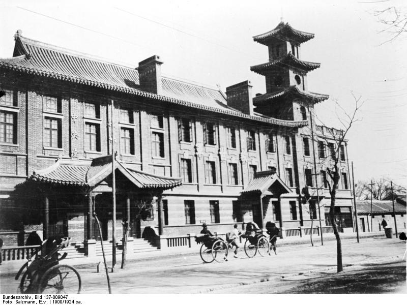 China, Peking.- Haus der Heilsarmee